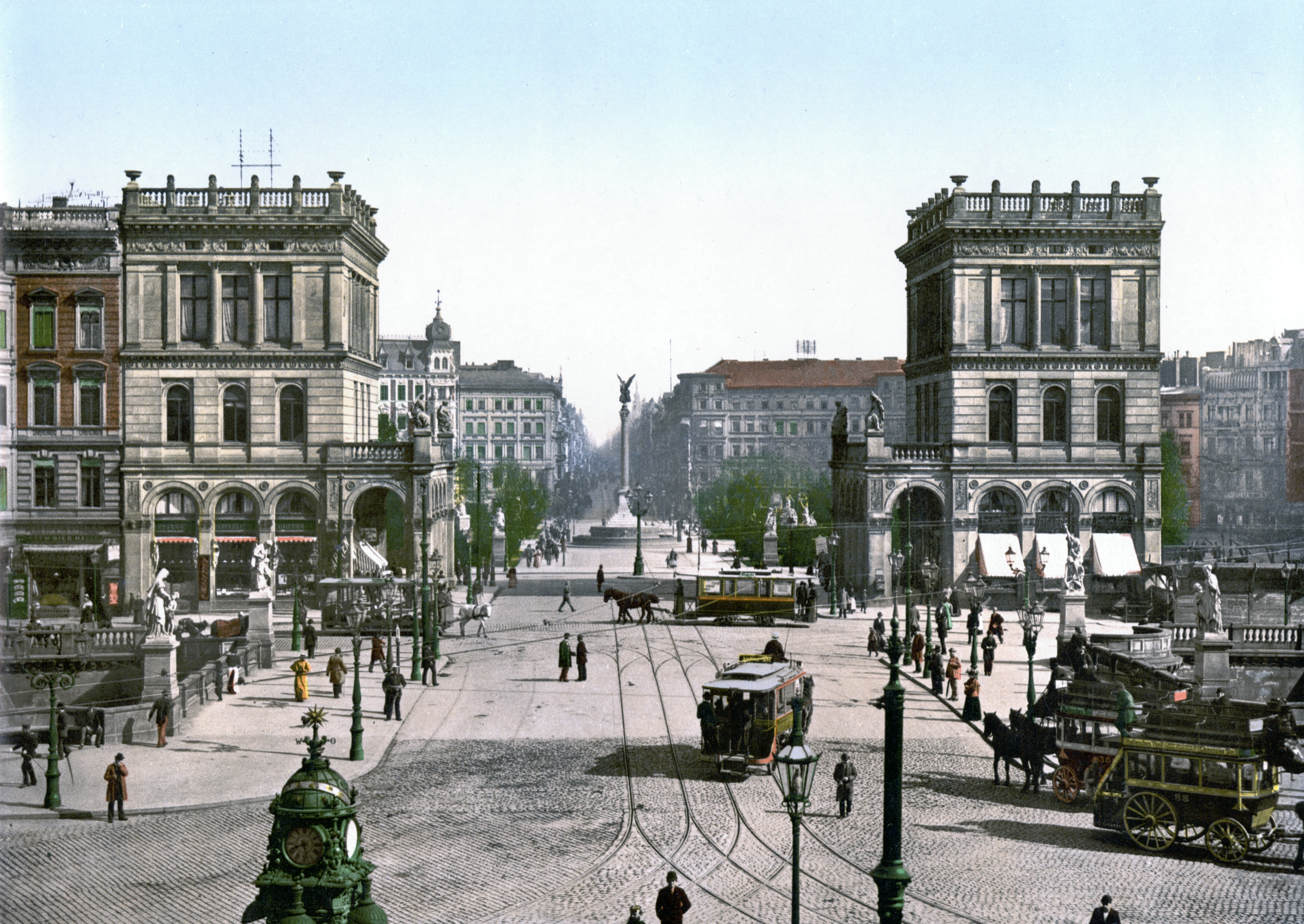 Berlin-Kreuzberg, Blick durch das Hallesche Tor nach Norden auf den Belle-Alliance-Platz (heute Mehringplatz) mit Bauten der Gründerzeit im Stil des Historismus. Im Vordergrund die Belle-Alliance-Brücke (heute Hallesche-Tor-Brücke) über den Landwehrkanal. Photochromdruck um 1900